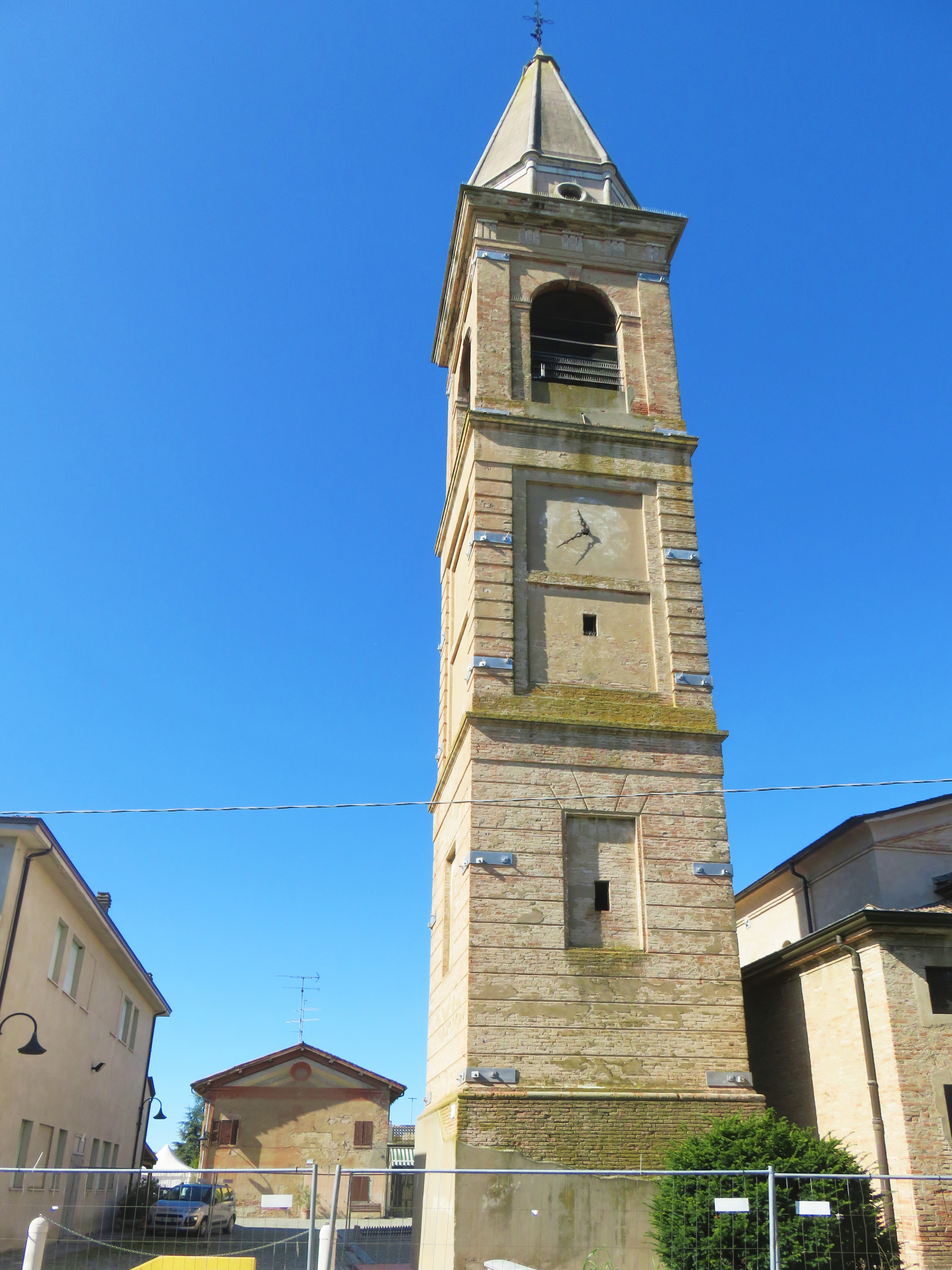 Chiesa dell'Invenzione della Santa Croce a Carpi. Campanile.